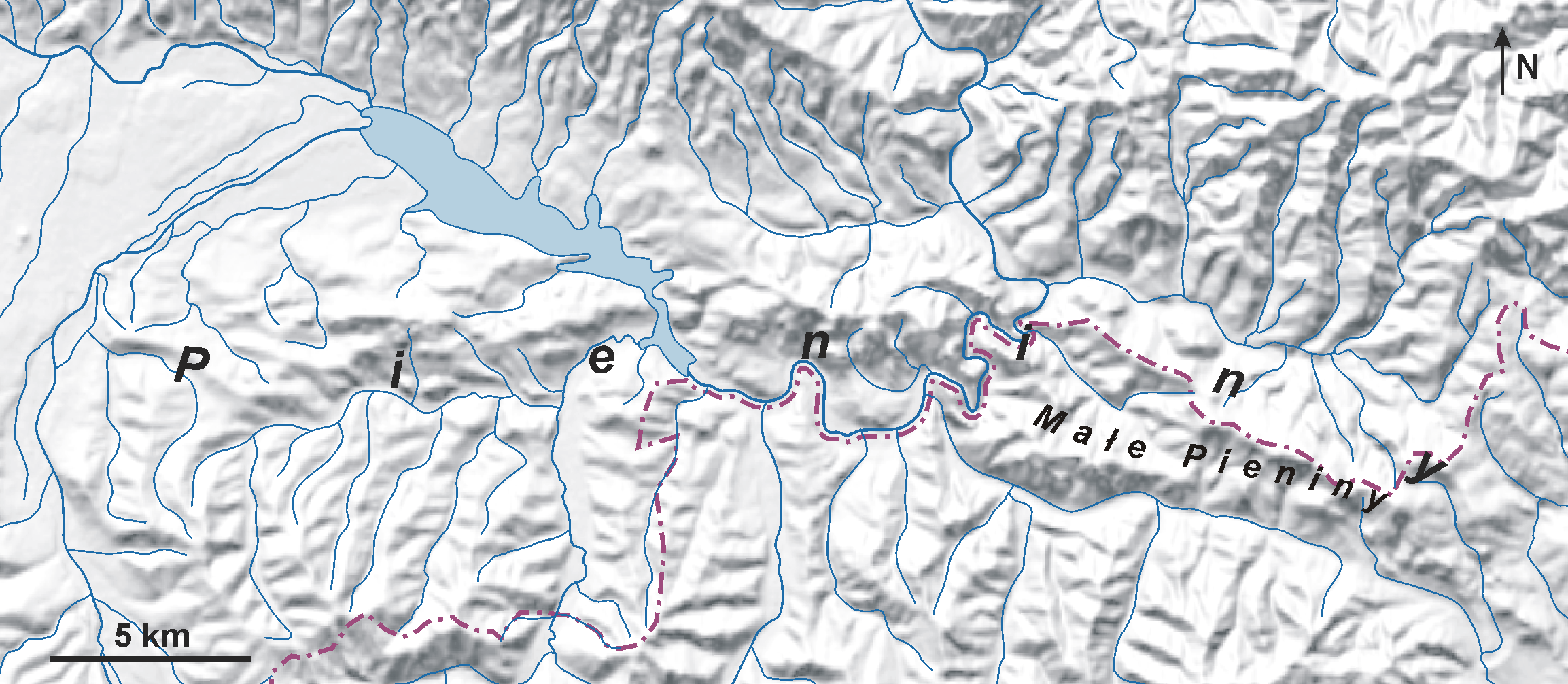 Pieniny (Małe Pieniny) – mapa plastyczna rzeźby terenu. Autor: Aotearoa